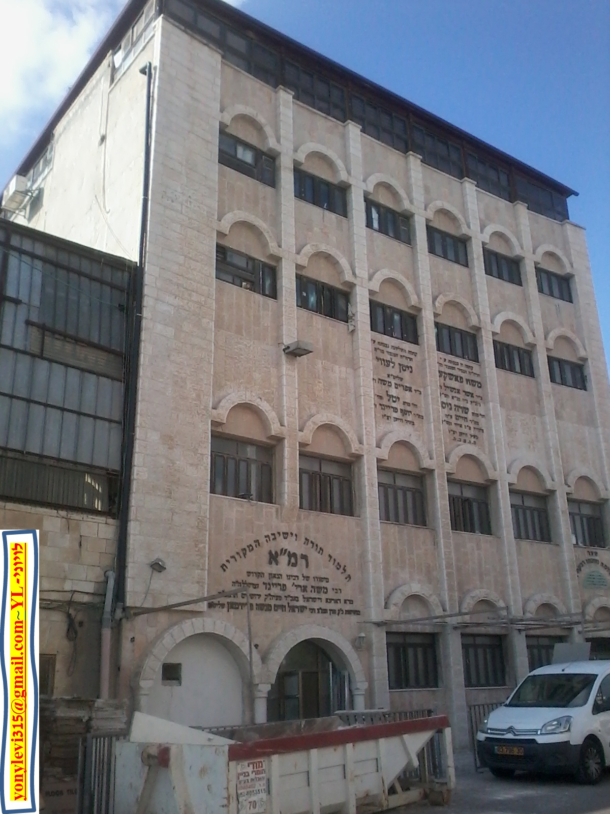 מוסדות רמ"א פריינד בירושלים, על שם רבי משה אריה פריינד